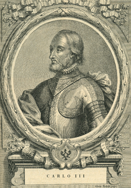 Carlo III il Buono, nono duca di Savoia